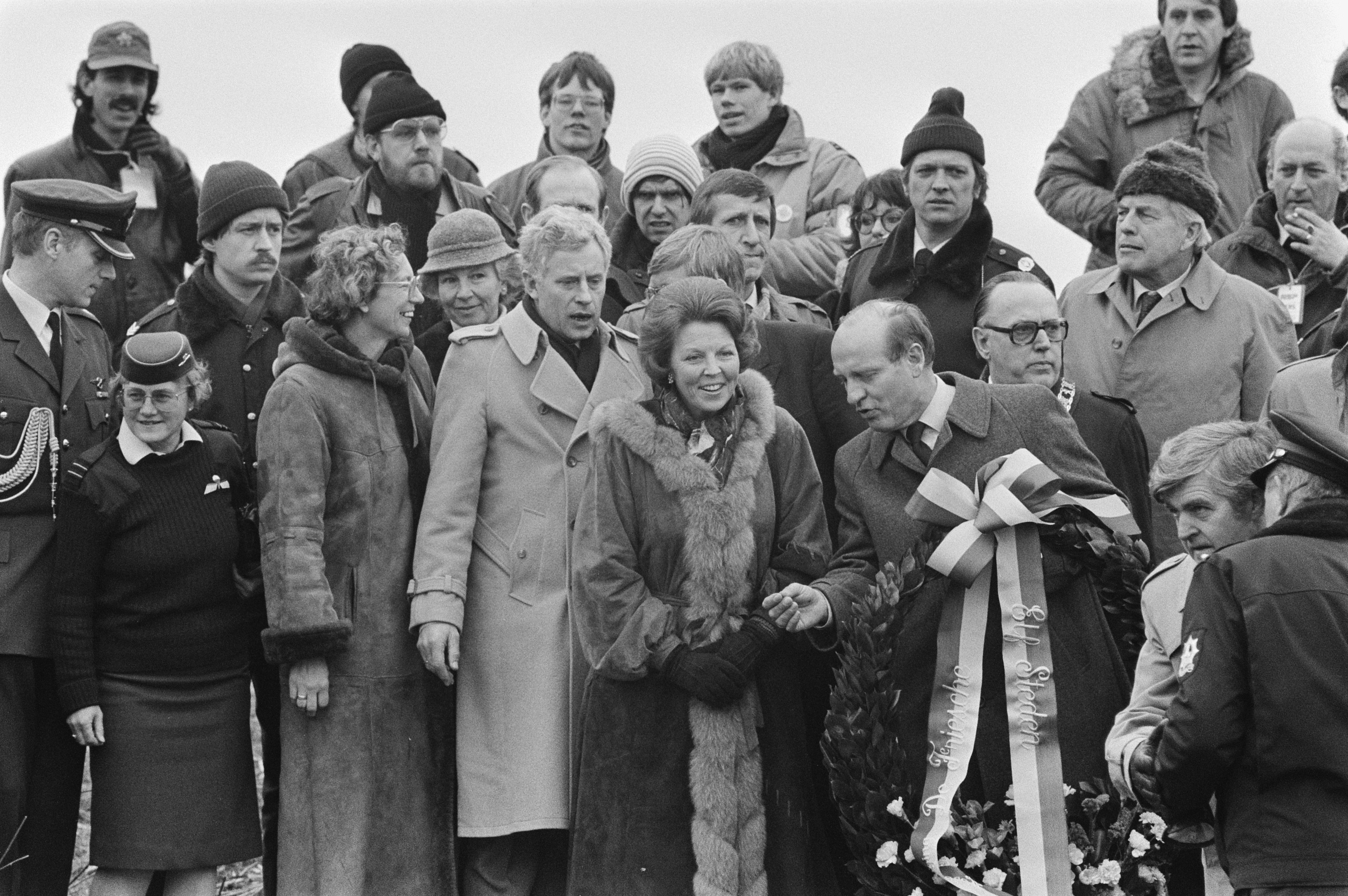 Collectie / Archief : Fotocollectie Anefo Reportage / Serie : [ onbekend ] Beschrijving : Elfstedentocht 1985, finish Leeuwarden; 2a Koningin Beatrix , Sipkema, CdK Wiegel Datum : 21 februari 1985 Locatie : Friesland, Leeuwarden Trefwoorden : koninginnen, schaatsen, sport Persoonsnaam : Beatrix, koningin Instellingsnaam : Elfstedentocht Fotograaf : Croes, Rob C. / Anefo Auteursrechthebbende : Nationaal Archief Materiaalsoort : Negatief (zwart/wit) Nummer archiefinventaris : bekijk toegang 2.24.01.05 Bestanddeelnummer : 933-2437